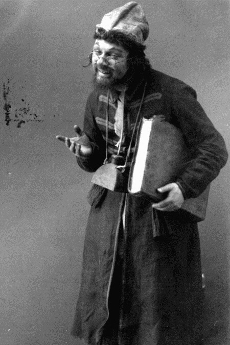 Сергей Витальевич Волгин — Подьячий ("Хованщина" М. Мусоргского). Фотография К. А. Фишера.